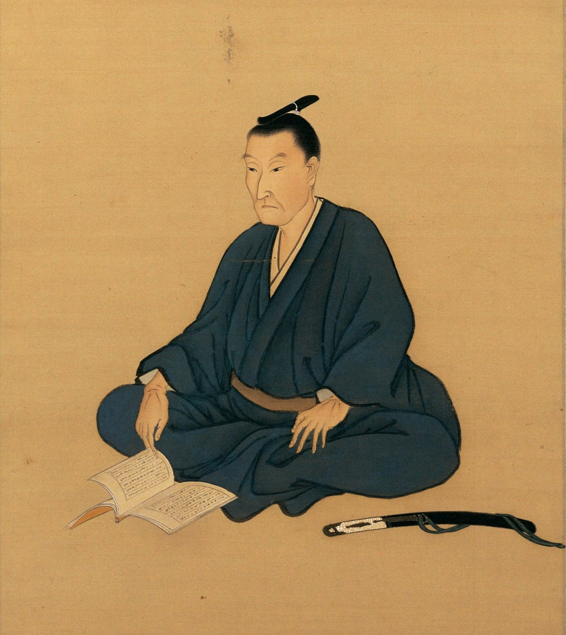 「絹本着色吉田松陰像（自賛）」の肖像部分